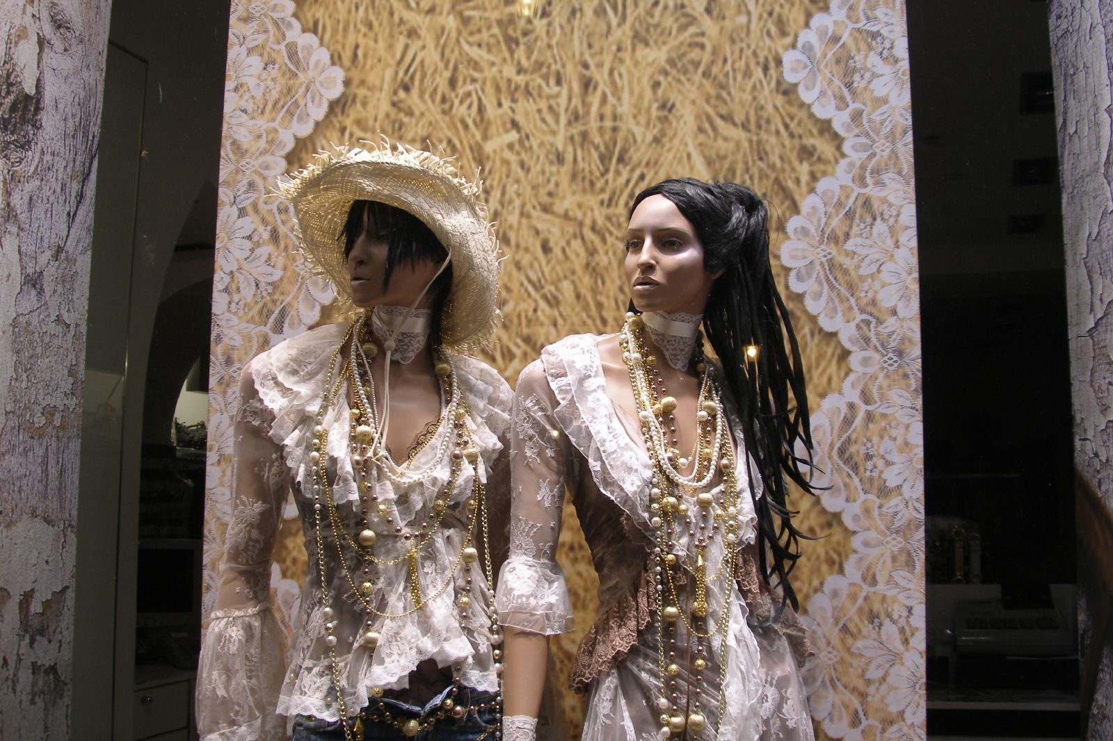 Prada design Roma 2006